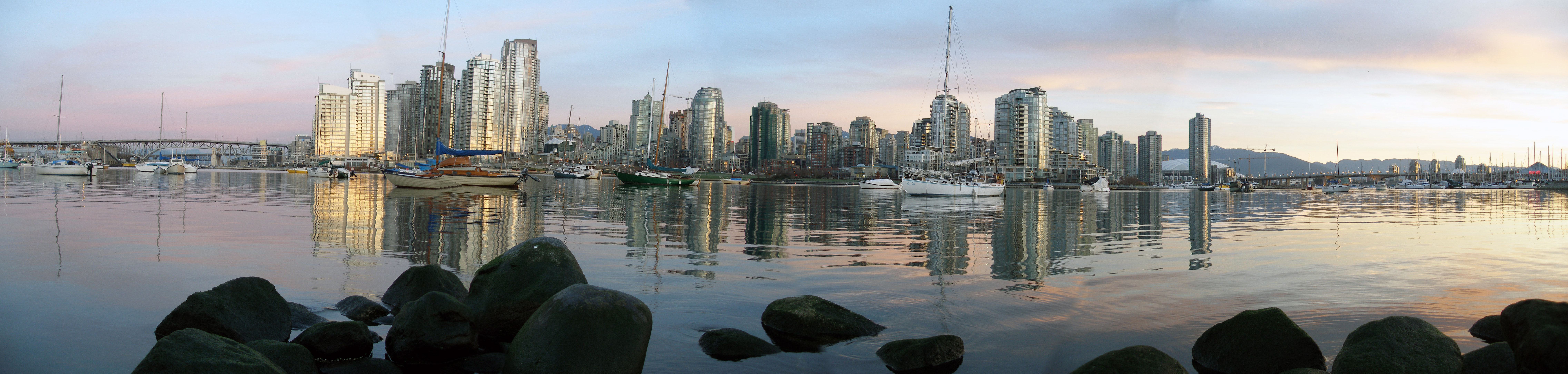 False Creek, Vancouver